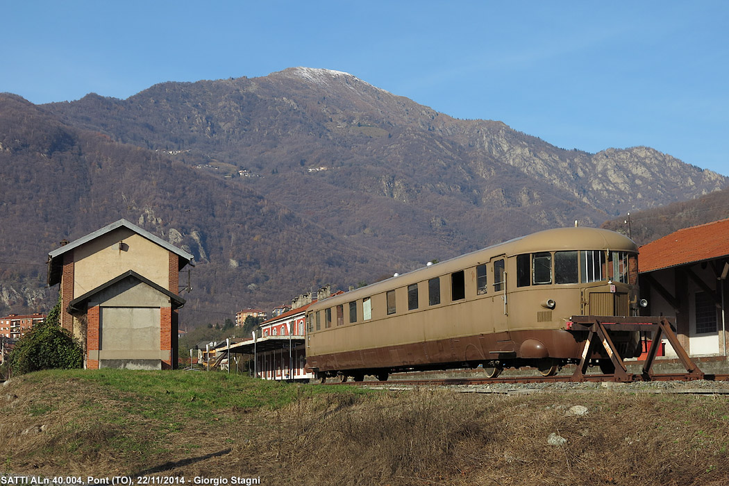 Stazione ferroviaria di Pont Canavese. L'automotrice termica ALn 40.004 restaurata come rotabile storico.